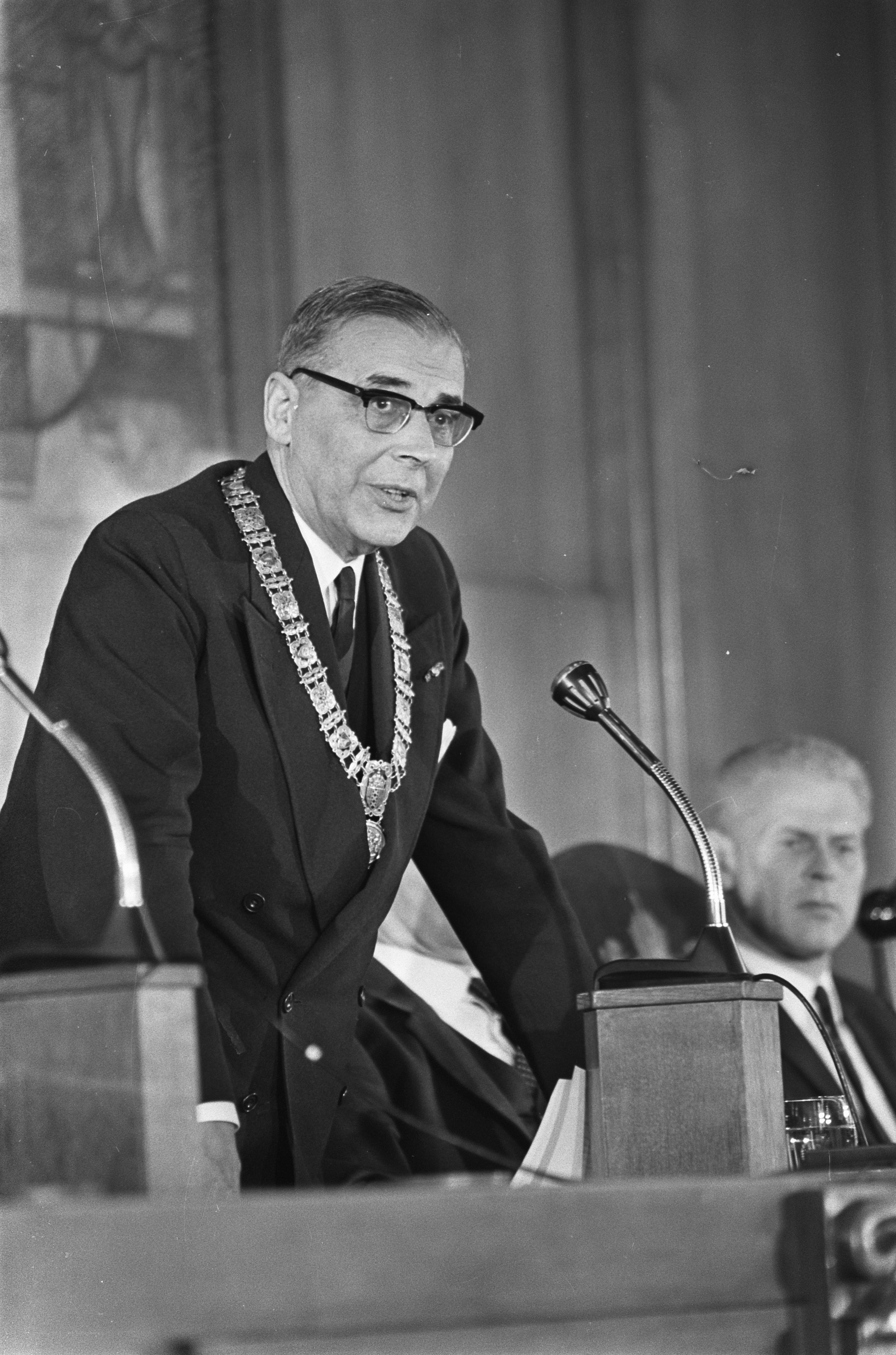 Collectie / Archief : Fotocollectie Anefo Reportage / Serie : Afscheid van burgemeester Van Hall van de raadsleden en het college van Amsterdam Beschrijving : Toespraak van Van Hall Datum : 30 juni 1967 Locatie : Amsterdam, Noord-Holland Trefwoorden : burgemeesters, gemeenteraden, toespraken Persoonsnaam : Hall, G. van Fotograaf : Ron Kroon / Anefo Auteursrechthebbende : Nationaal Archief Materiaalsoort : Negatief (zwart/wit) Nummer archiefinventaris : bekijk toegang 2.24.01.05 Bestanddeelnummer : 920-4497